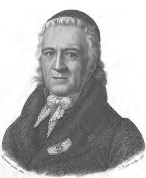 Carl Leonhard Reinhold